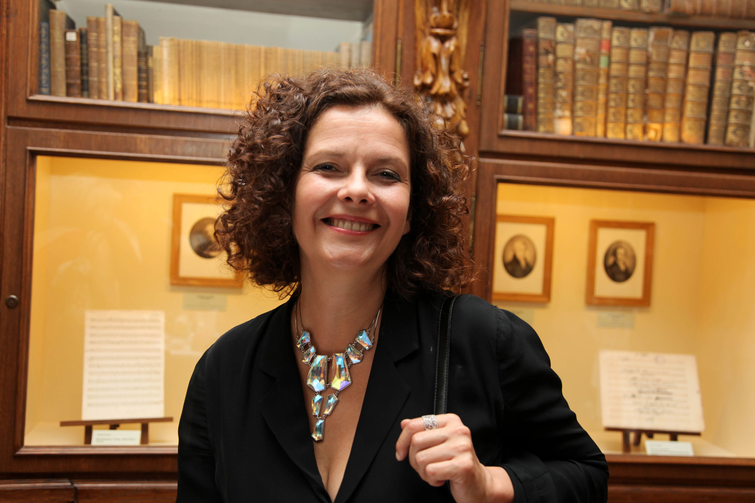 Kirchschlager_Angelika-5516 ; 19.08.2010: Musik-Festival Grafenegg